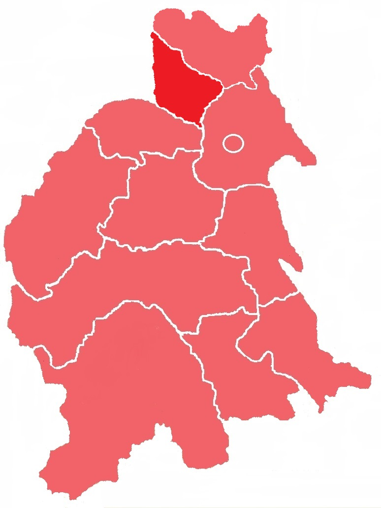 Кіцманьський повіт